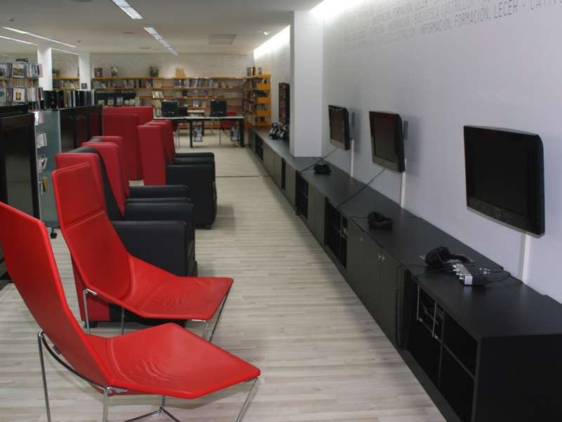 Sala de audiovisuales de la Biblioteca Municipal Castrillón de A Coruña, España